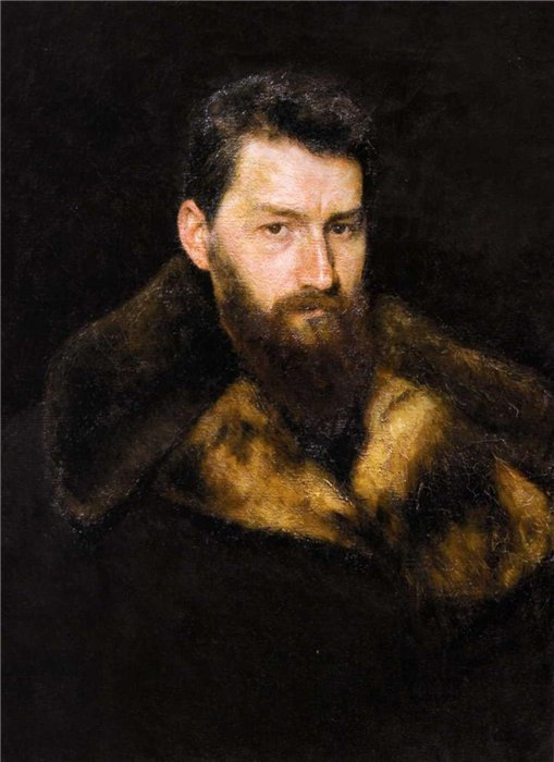 Василий Савинский Портрет Исаака Лейбовича Аскназия 1885 г. Научно-исследовательский музей Российской Академии художеств.